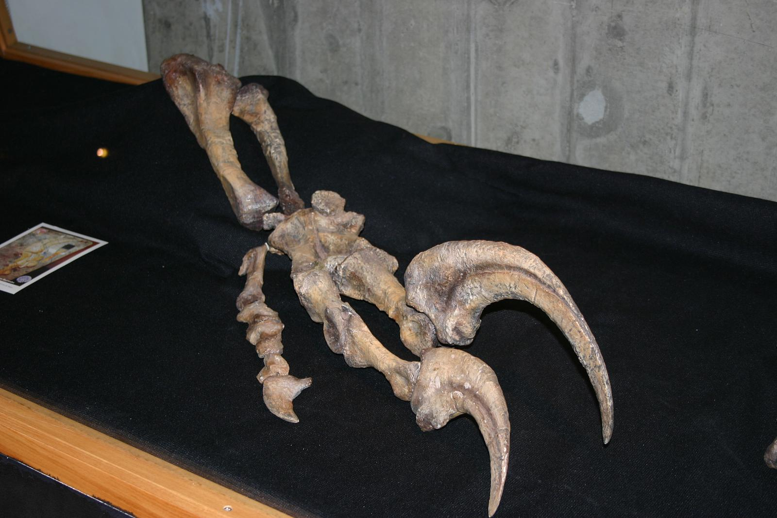 dinosauri 013